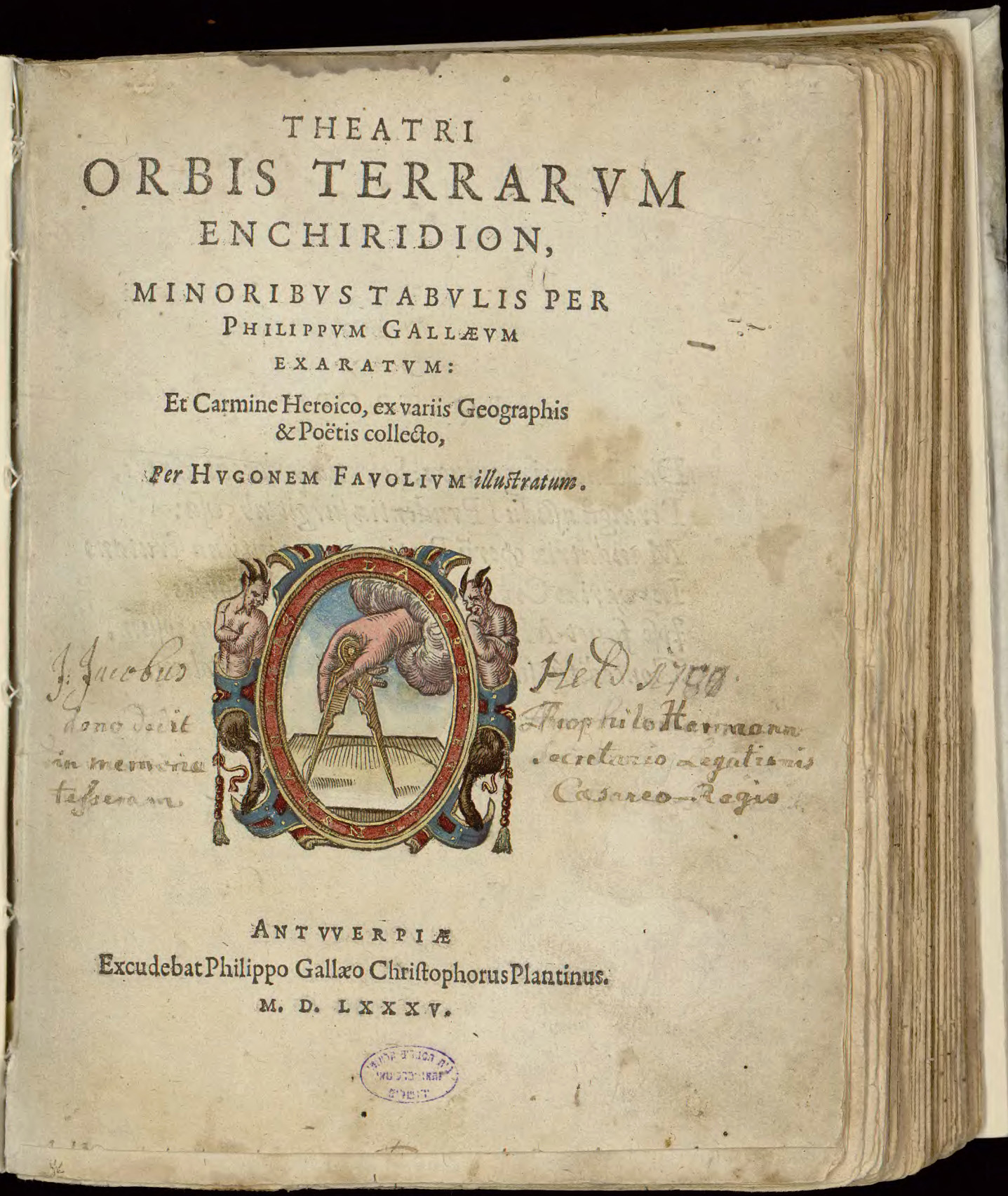 Titelpagina van Het Enchiridion, het eerste 'Epitome' in het Latijn, 1585